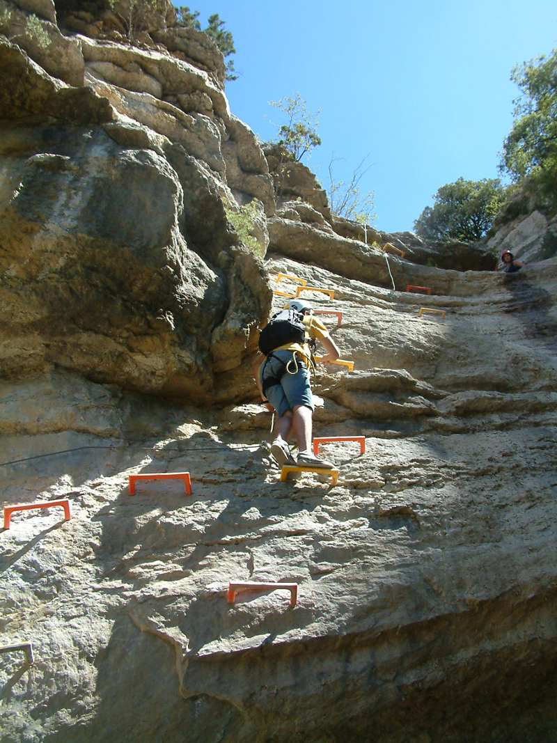 Ascensión de la Cascada Federica en la vía Ferrata Olmo-Urquiza, Montsec d'Ares Enlace con la página del autor Vías ferratas en español- Imágenes e información de vías ferratas en España, Francia y Andorra